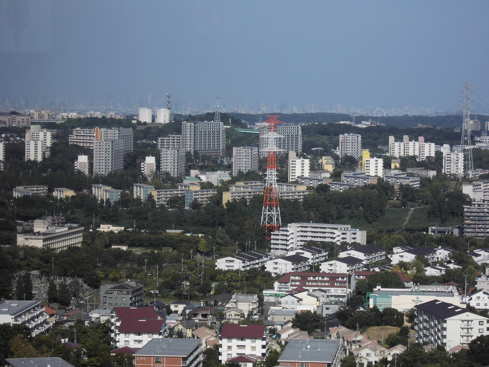 多摩ニュータウン初期の地区と、都心のビル群130817